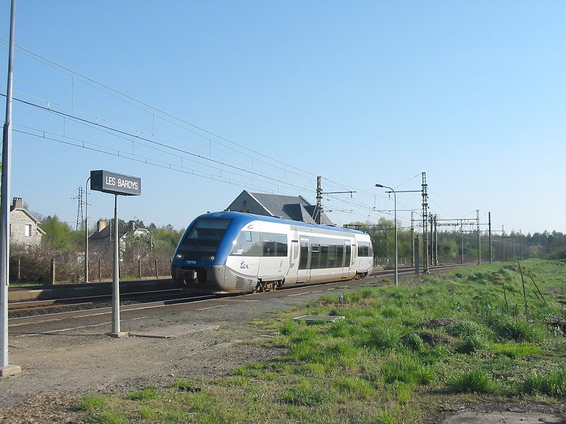 Autorail X73500 à l'arrêt en gare des Bardys - Il effectuait la liaison Limoges - Guéret.